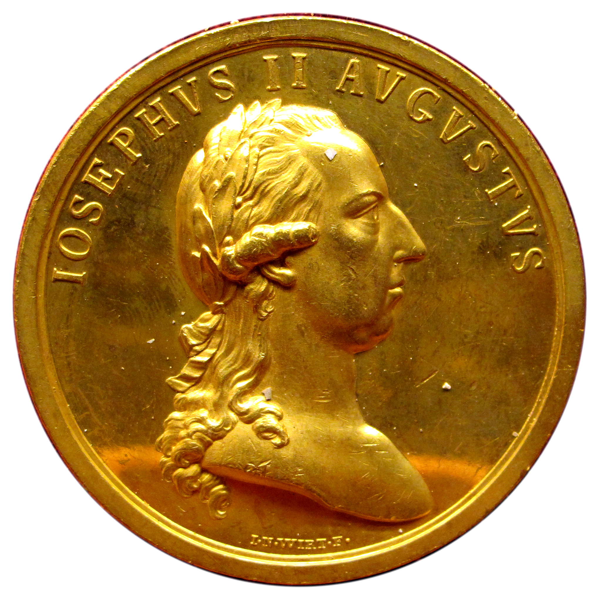 Medaglie austriache, varie date